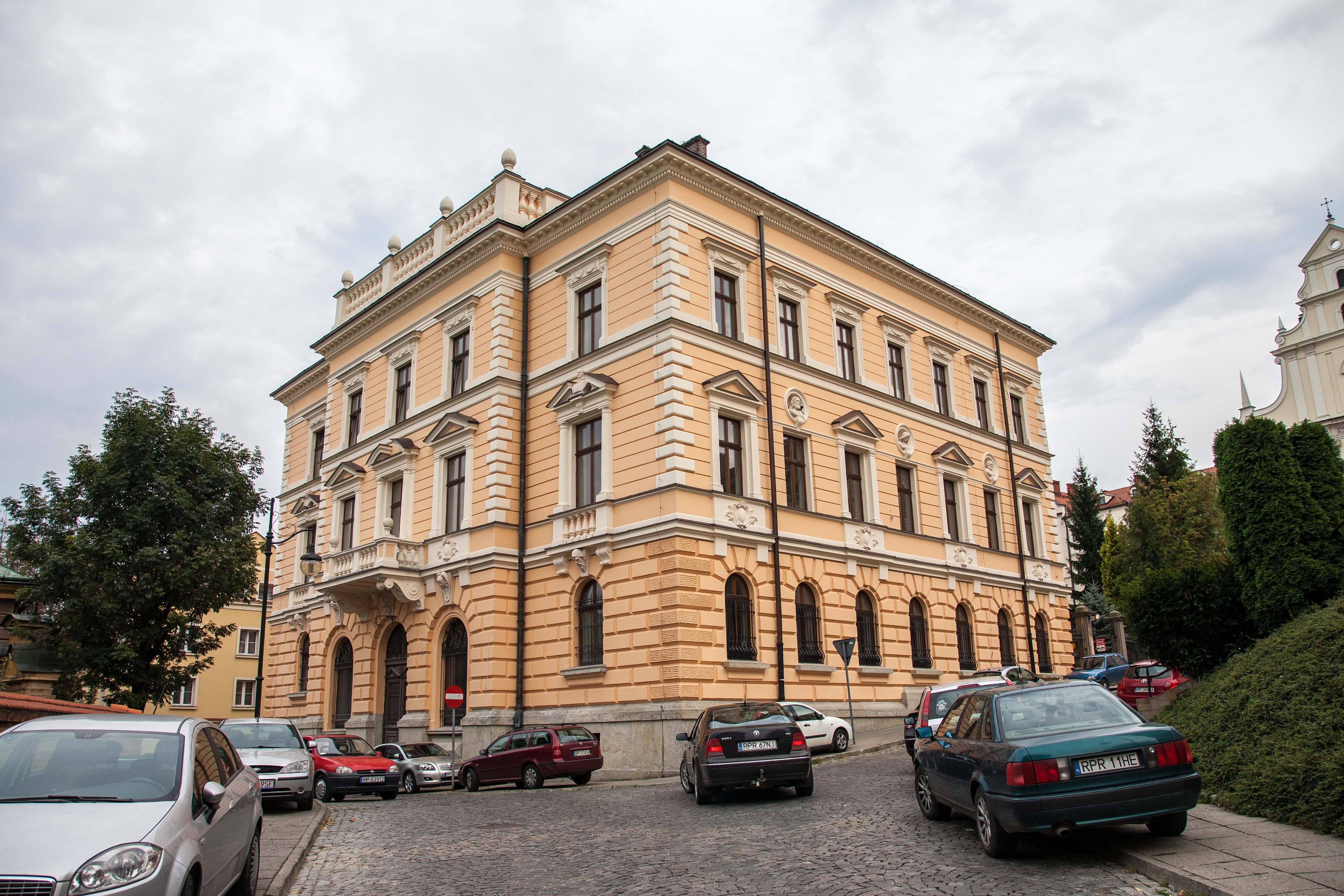 Pałac biskupów greko-kat., mur., XIX/XX Przemyśl, pl. Czackiego 1 (d.3), Przemyśl 06.1983.